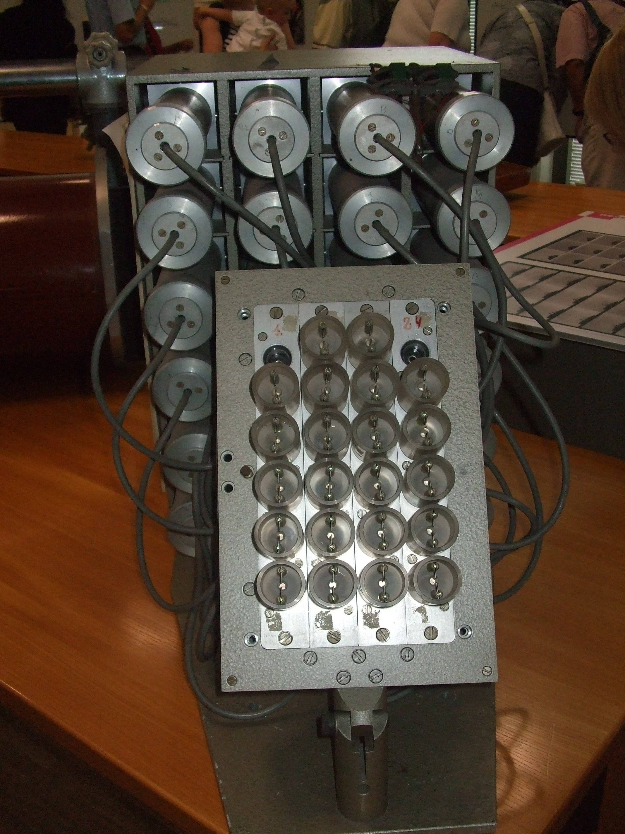 Blitzkopf, der 24 Funkenstrecken erzeugt - Cranz-Schardin-Verfahren.